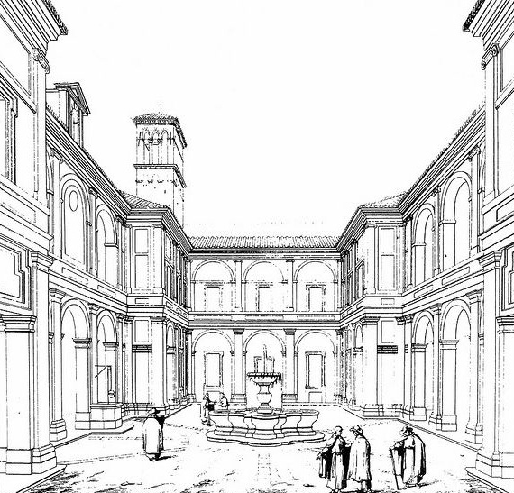 Chiostro di Sant'Eusebio all'Esquilino, incisione (1850)